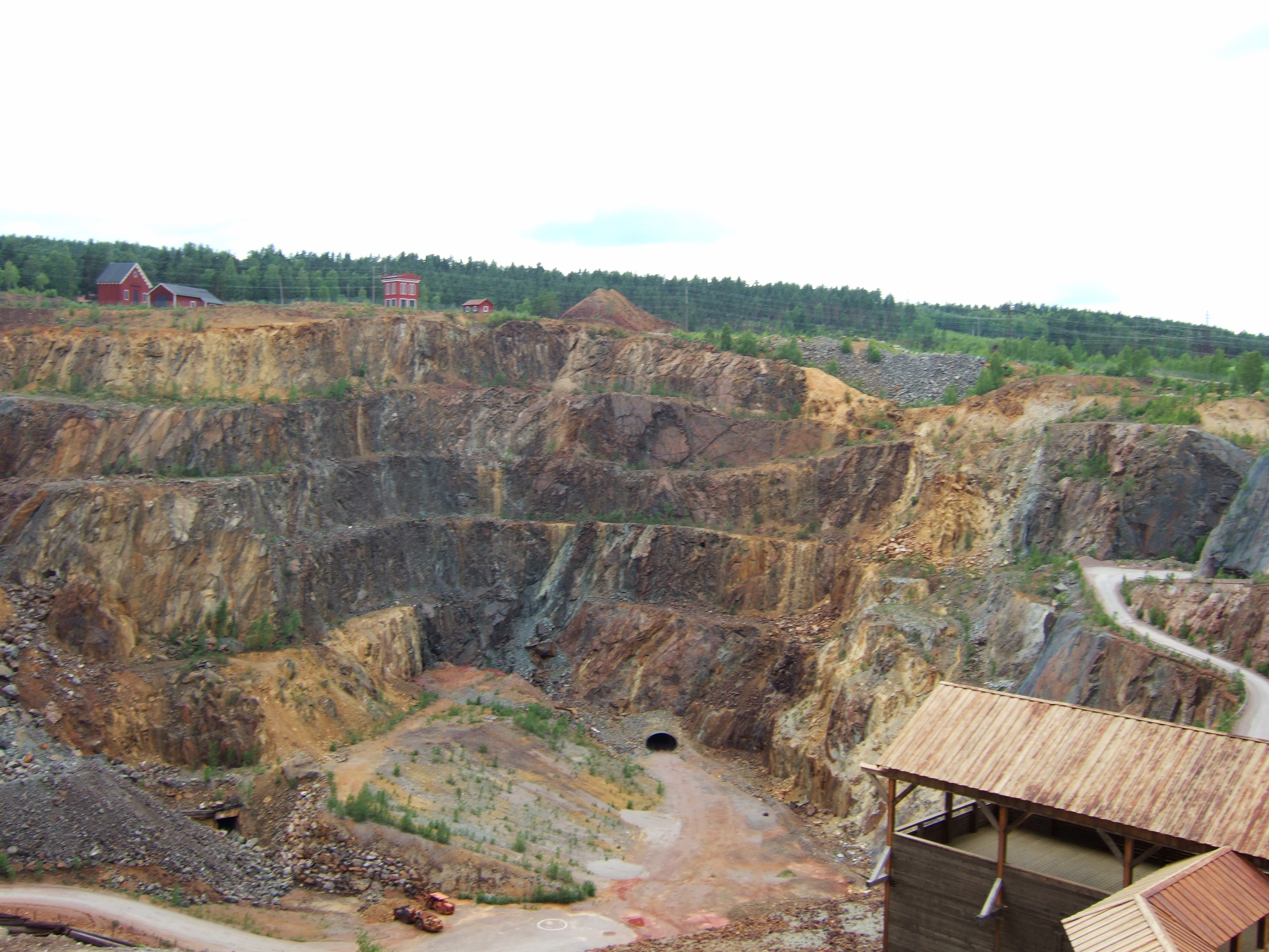 Open-cast Stora Stöten in Falun copper mine, Dalarna (Dalacarlia), Sweden.